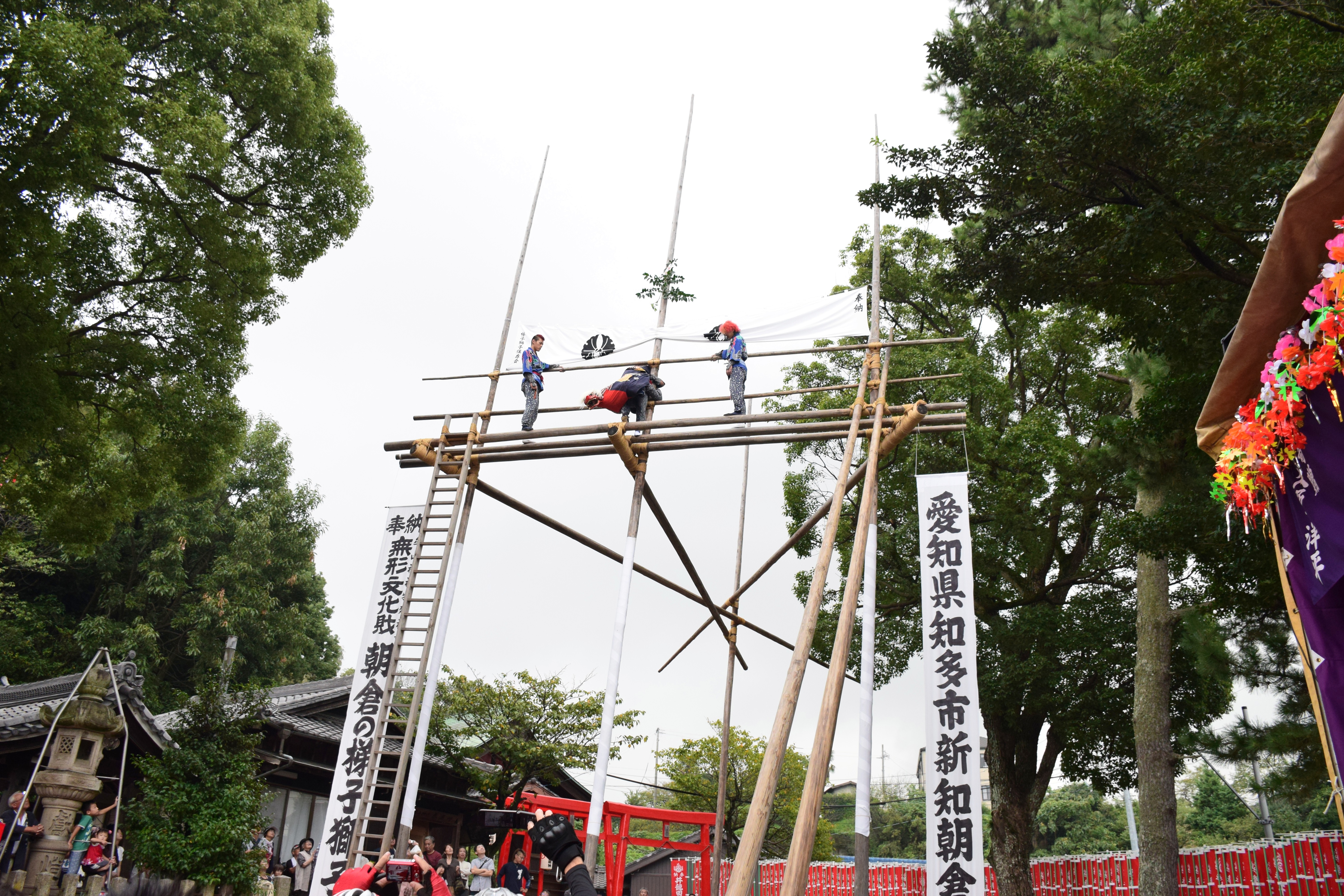 朝倉の梯子獅子 Nikon D5300